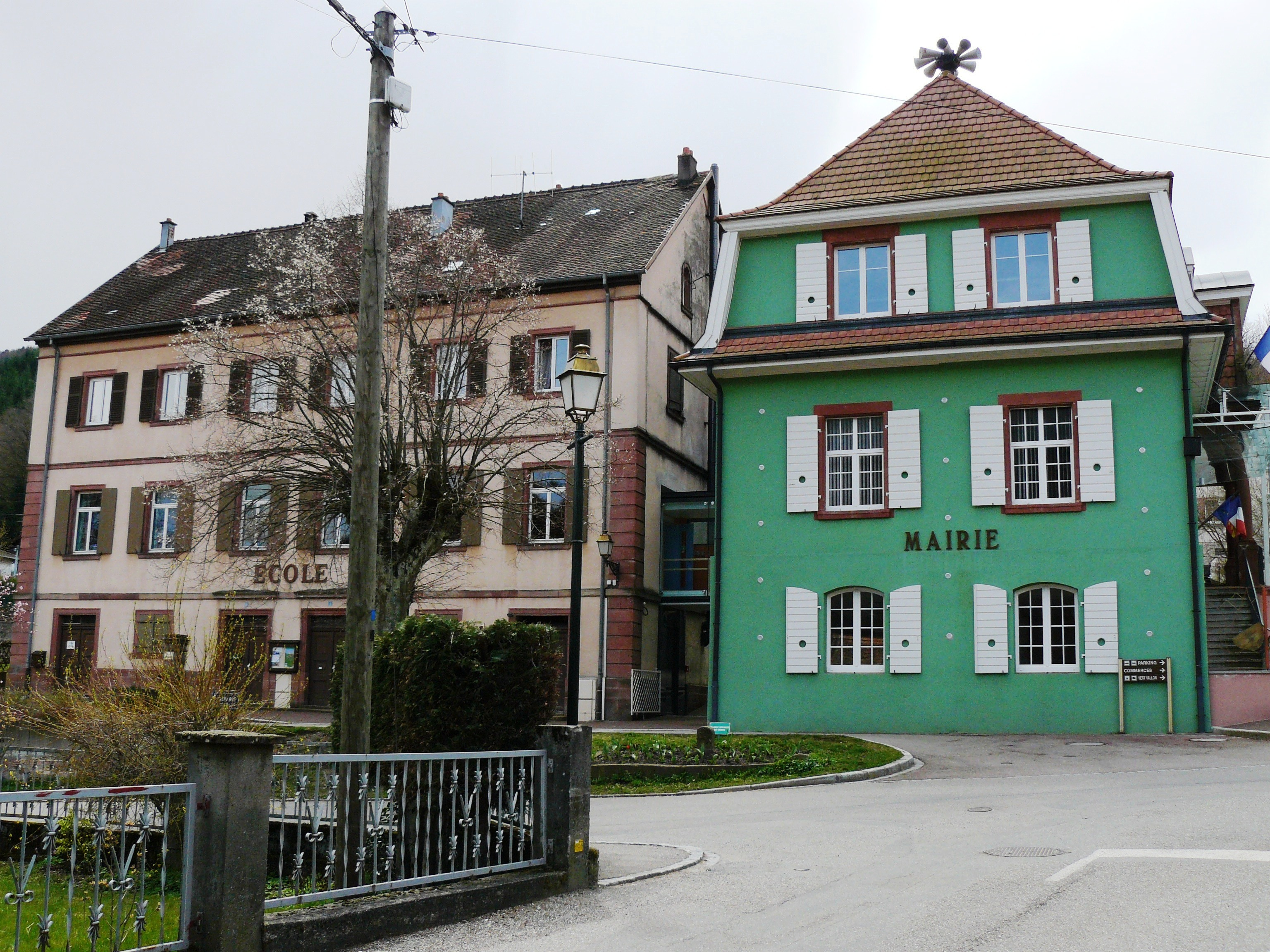 Lautenbach_Zell_131.JPG